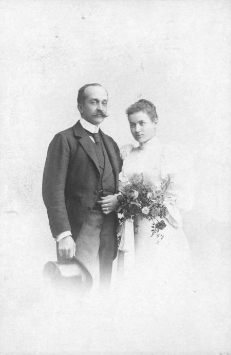 Miguel und seine Maria Theresia.